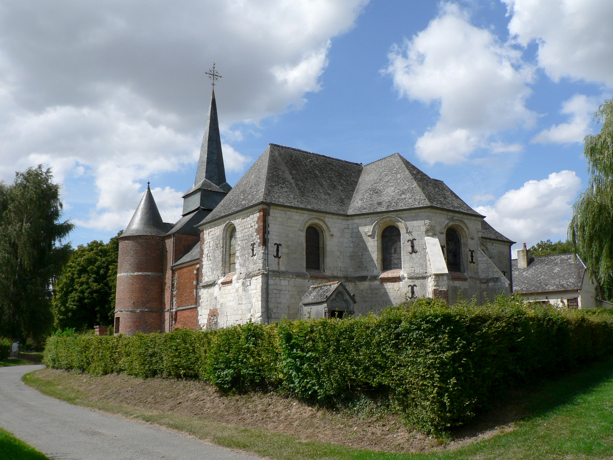 Église fortifiée de Gronard, Aisne, France